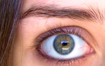 a mixed eye